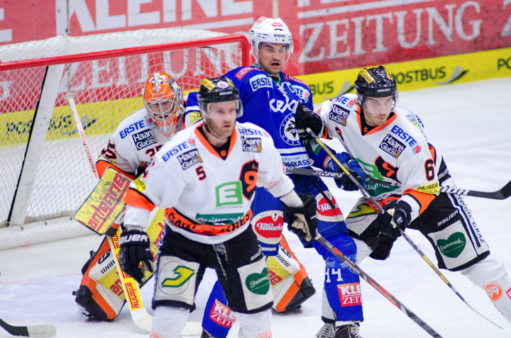 25.10.2013, Stadthalle Villach, AUT, EBEL, 28. Runde, EC VSV vs. Graz 99ers, im Bild Curtis Fraser, (EC VSV, #44),Dustin VanBallegooie, (99ers #5),Stefan Lassen, (99ers #6),// frostworx Pictures © 2013, PhotoCredit: frostworx / Alex Micheu